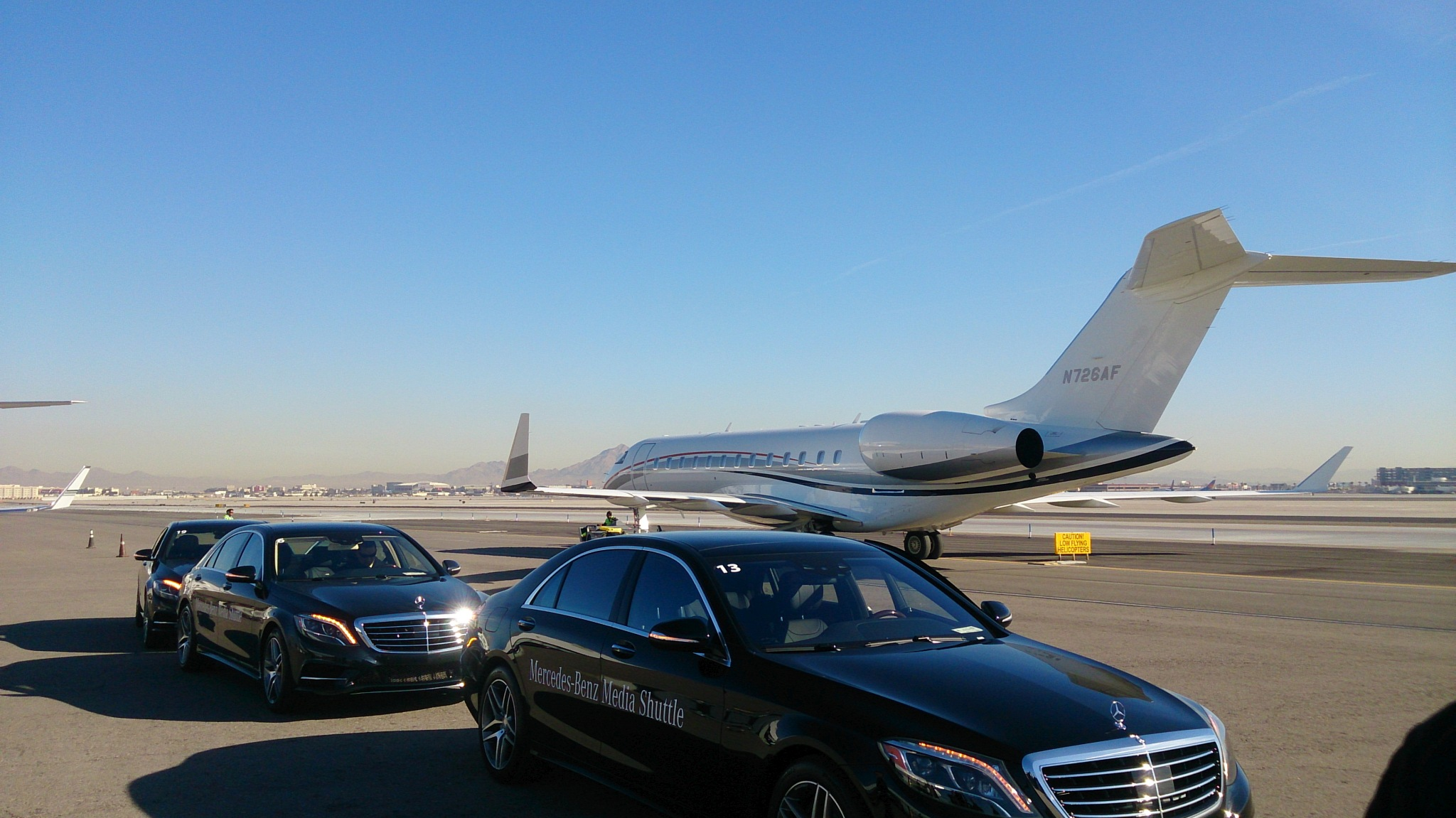 Las Vegas Airport